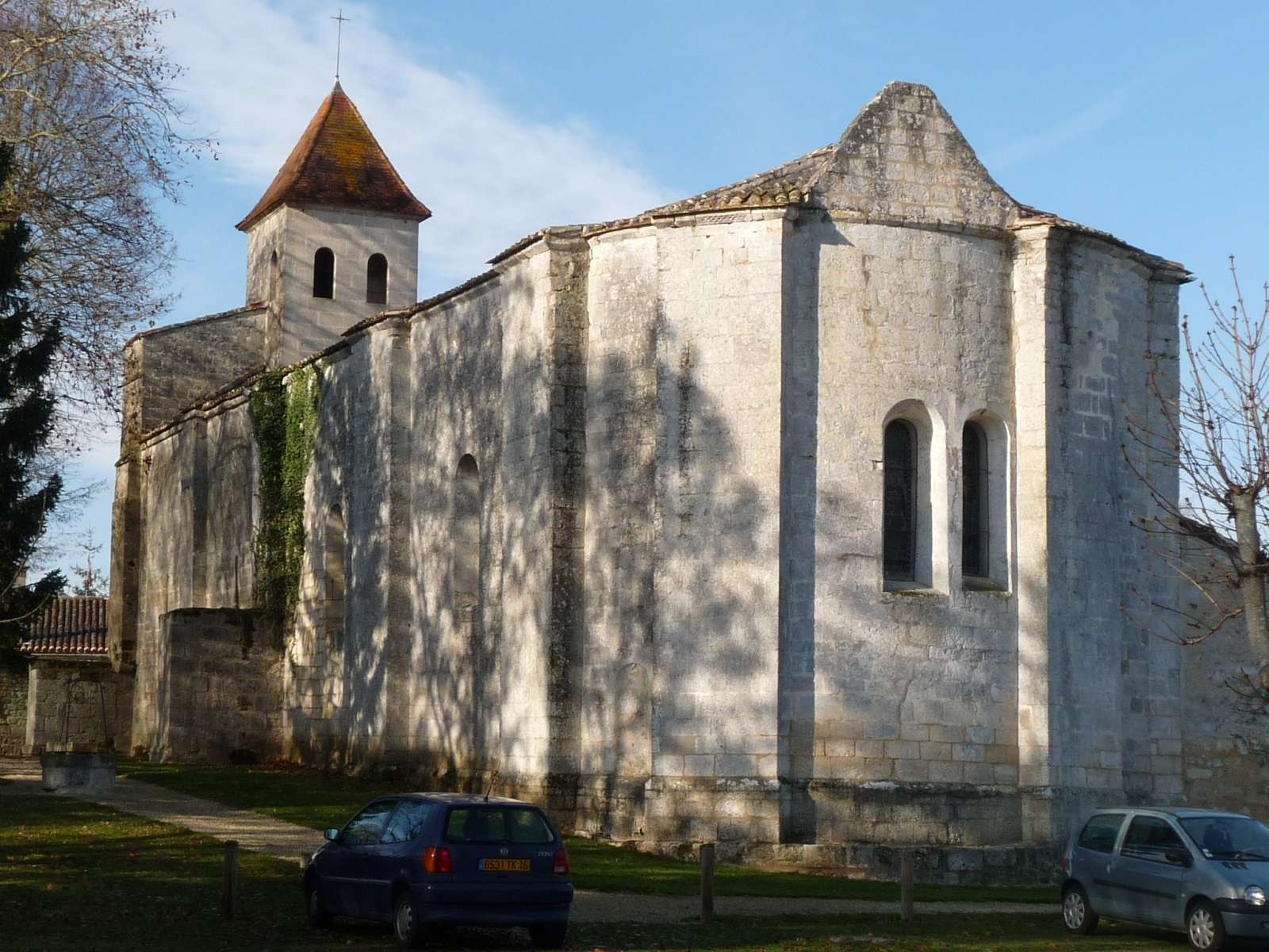 église de Garat, Charente, France